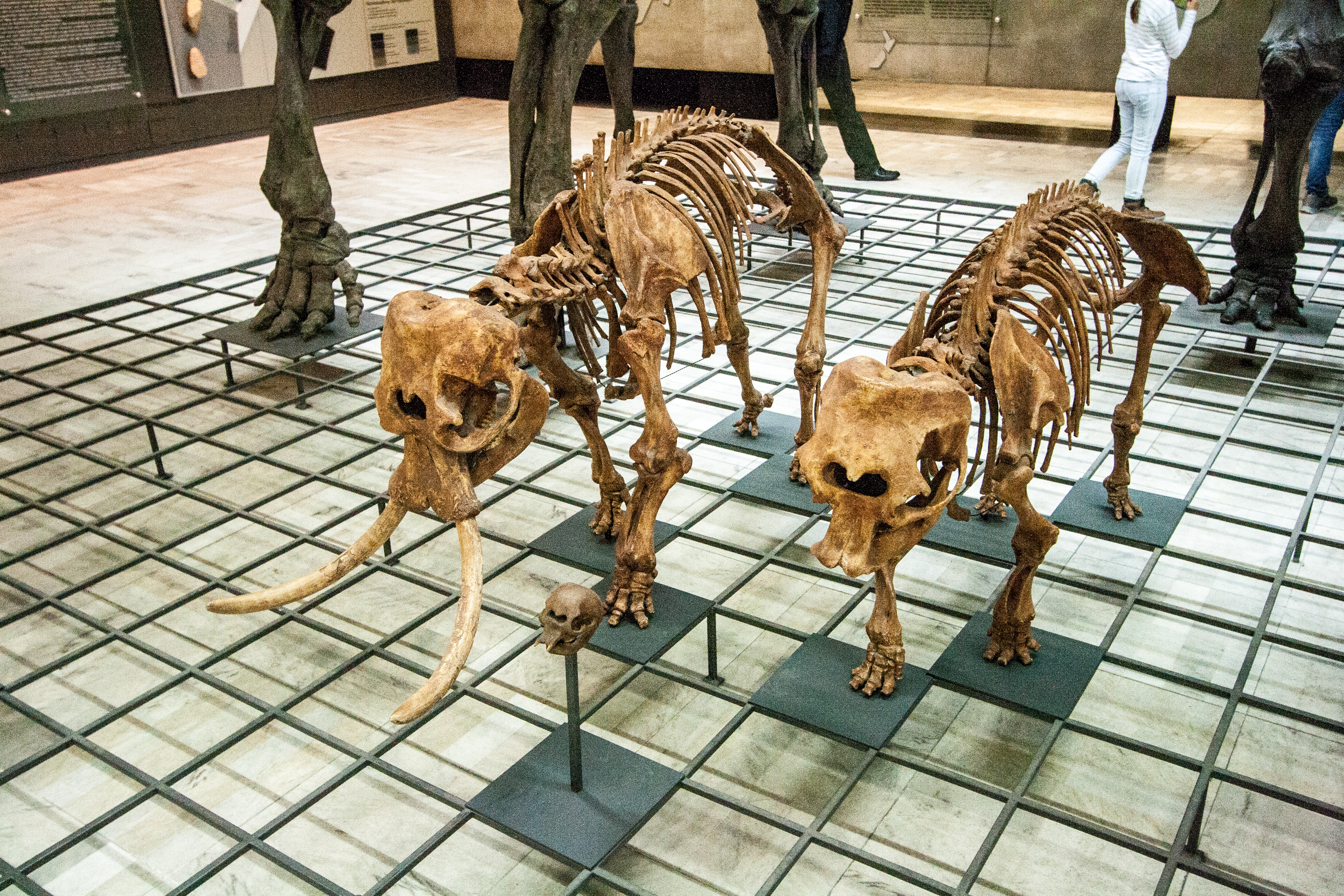 Palaeoloxodon falconeri, Zwergelephantlabel QS:Len,"Zwergelephant"label QS:Lhu,"Szicíliai törpeelefánt, hím, nőstény és egy fiatal állat koponyája, kb. 70.000 évvel ezelőtt éltek"